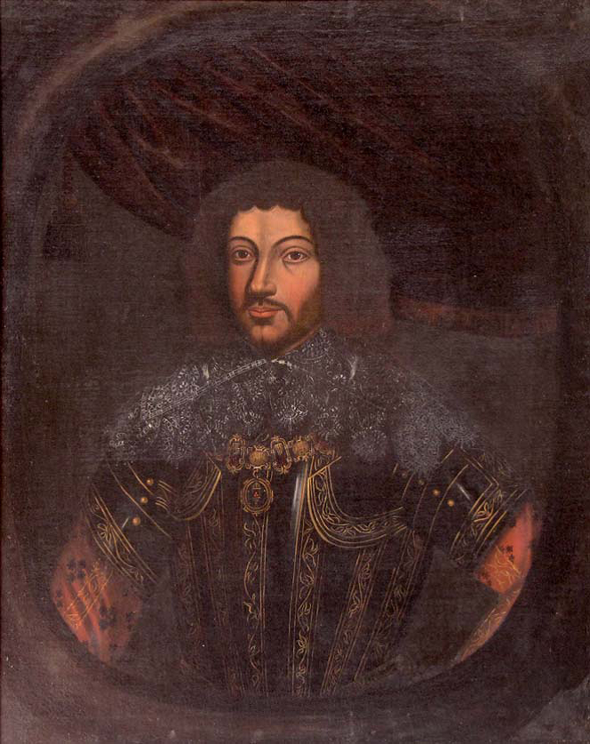 Ritratto di Ferdinando Carlo Gonzaga Nevers